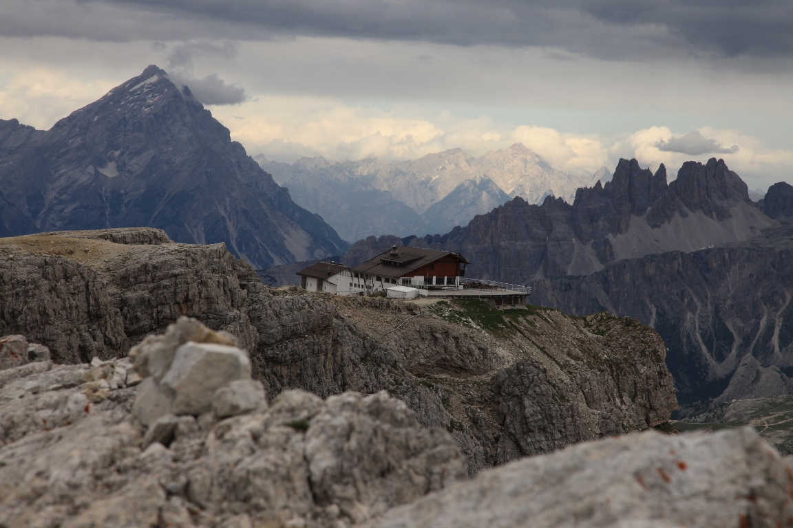 Rifugio Lagazuoi 07/2010